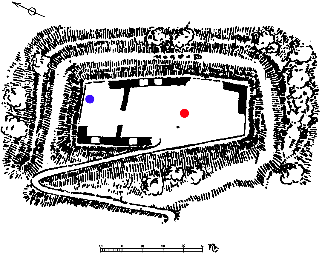 Skizze der Ruine Schneeburg mit Standortmarkierungen des Fotografen